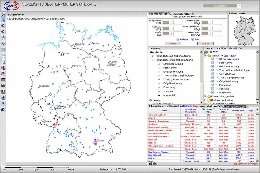 Screenshot des Geothermischen Informationssystem